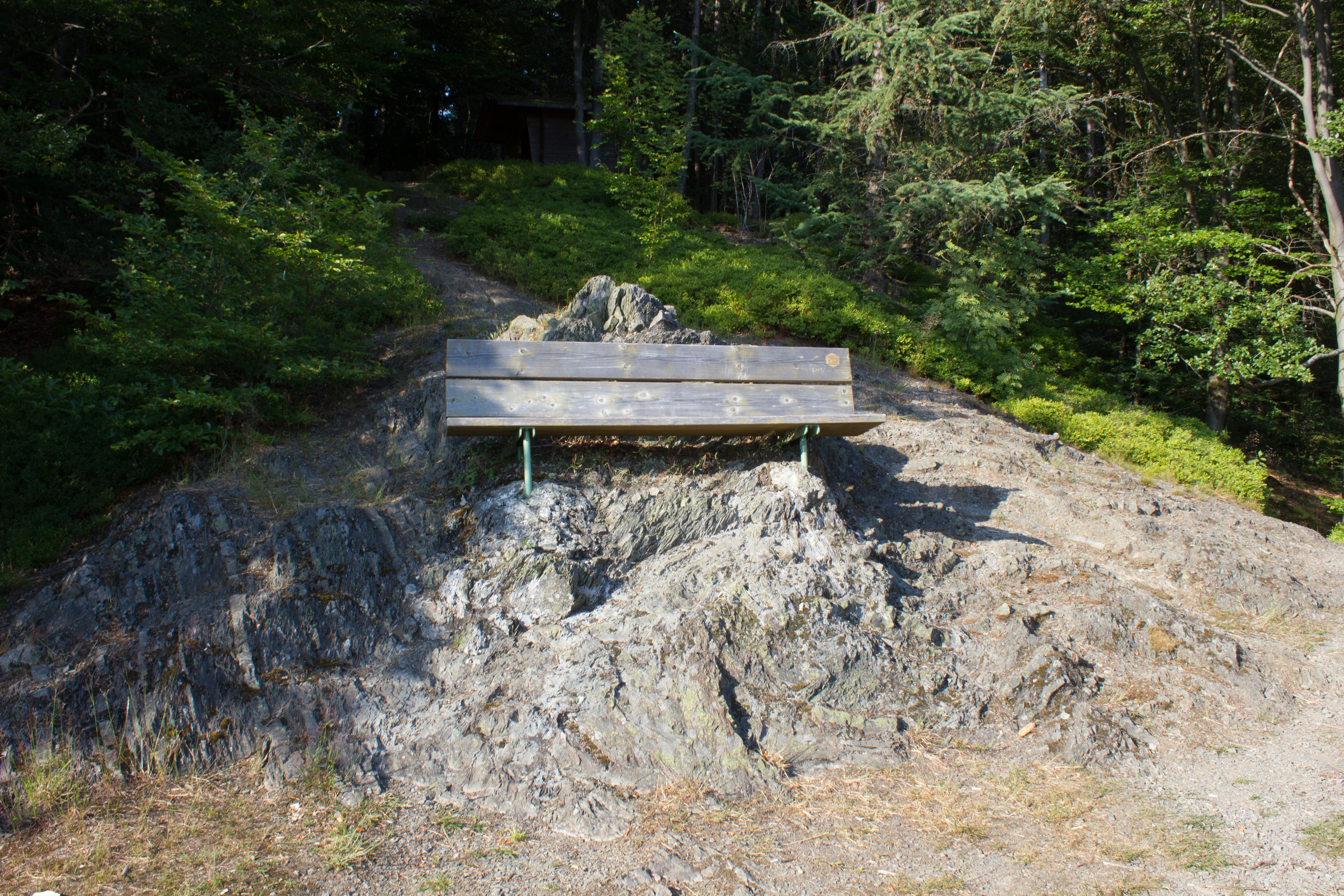 Kämmleinsfelsen südwestlich von Geroldsgrün, Geotop 475R002